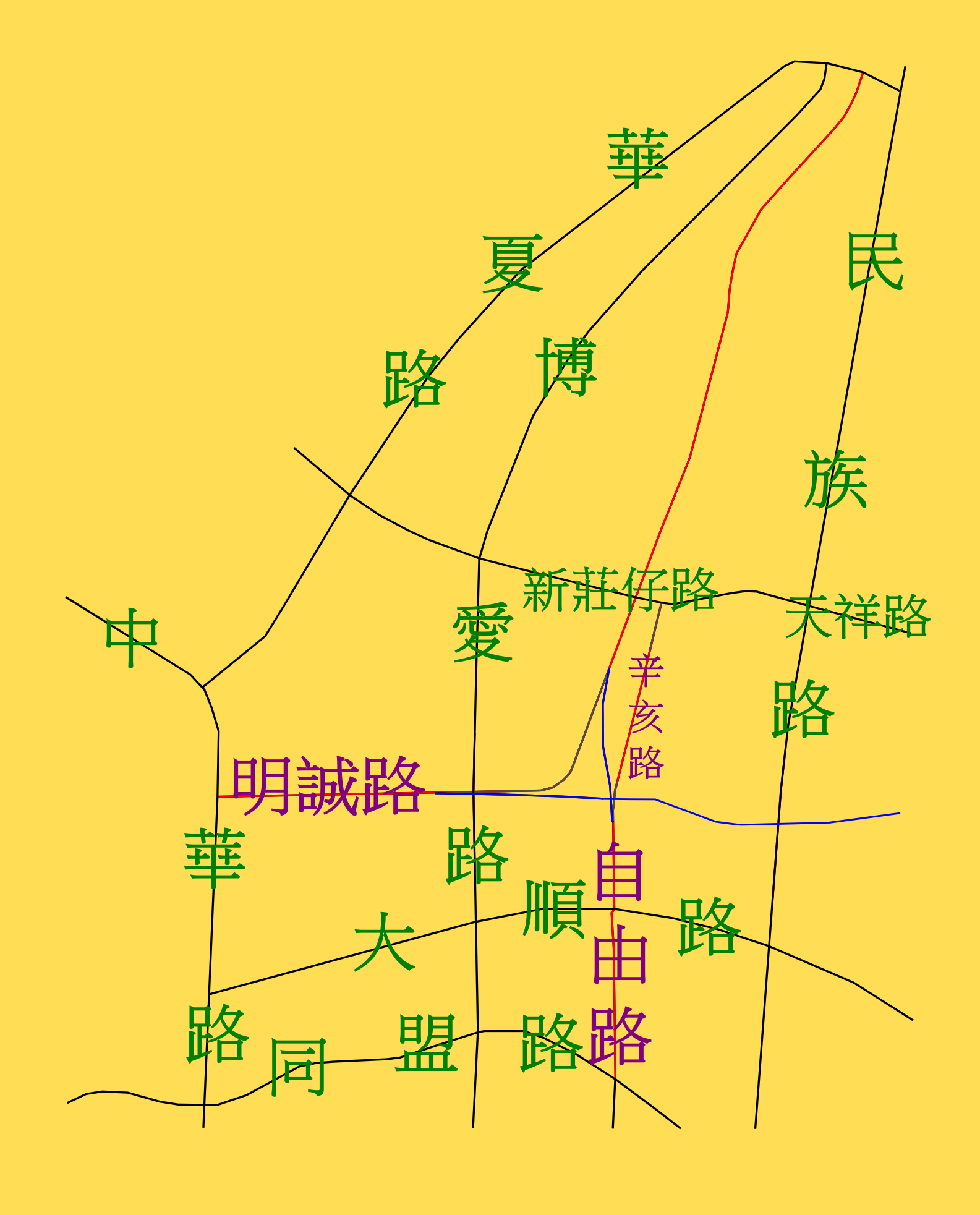 依據1980年高雄市都市計劃圖與1999年經建版地形圖第三版之高雄市明誠路與自由路與其周邊道路。